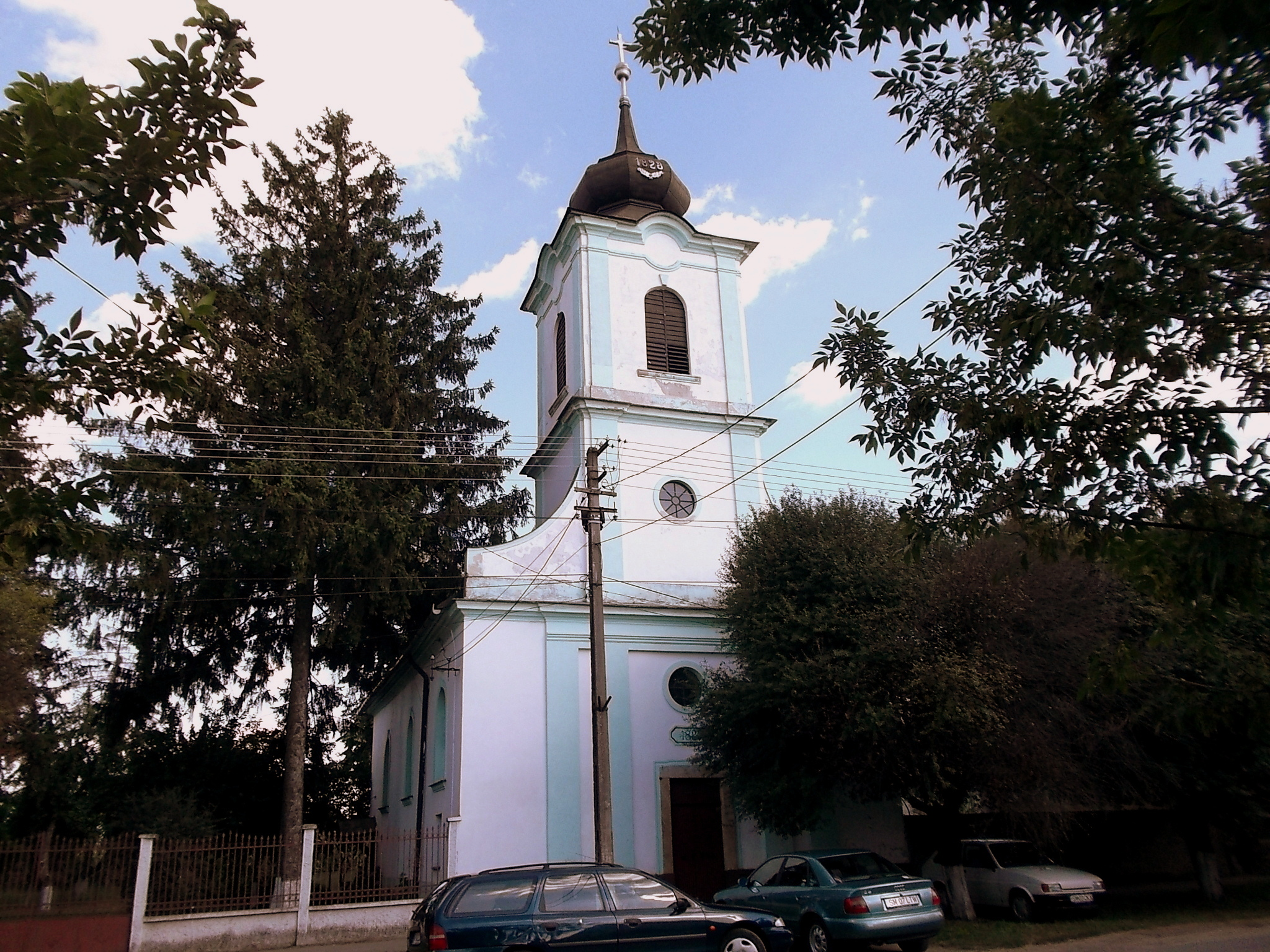 Biserica luterană din Carei, judetul Satu-Mare